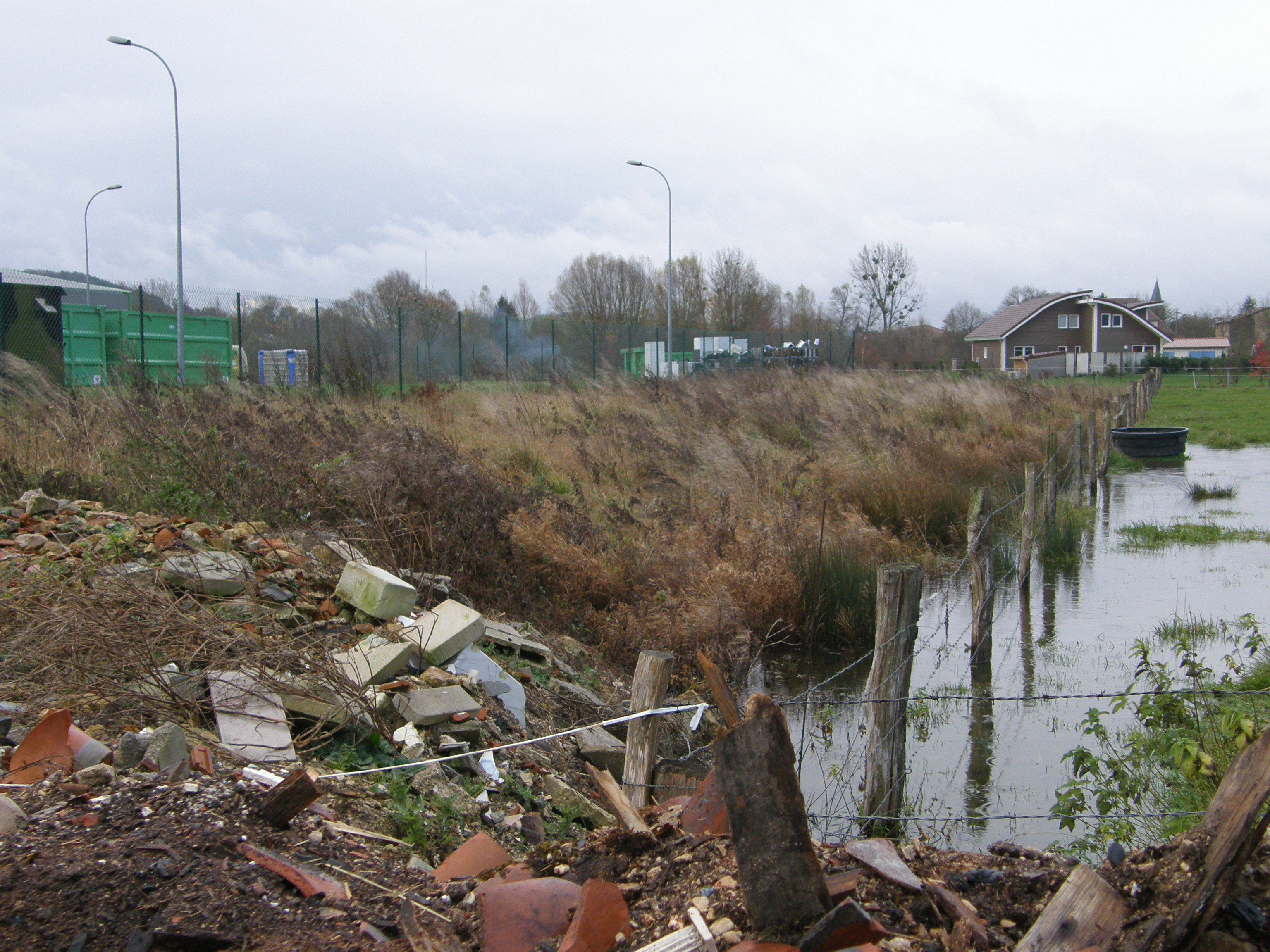 Centre de stockage de déchets inertes de Damvillers (Meuse)